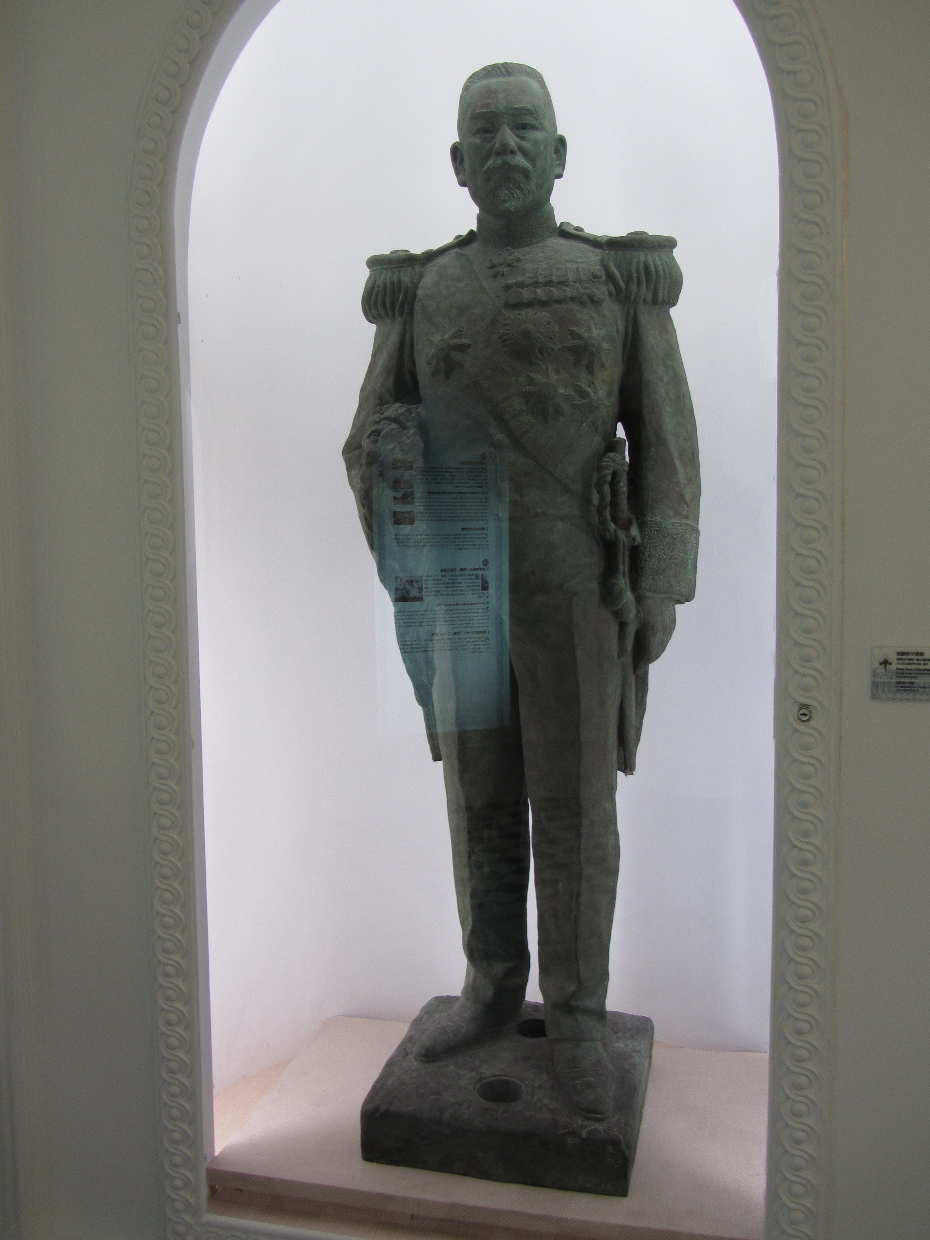 國立臺灣博物館內的後藤新平銅像。